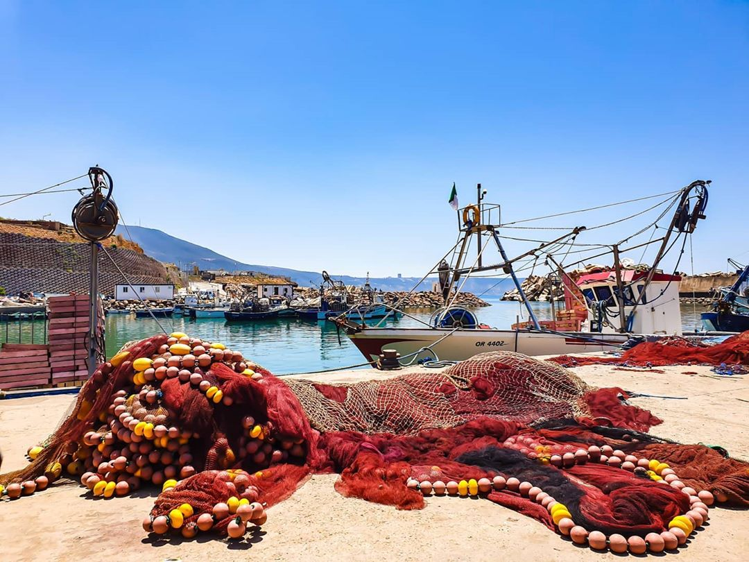 Le port de kristel situer a oran